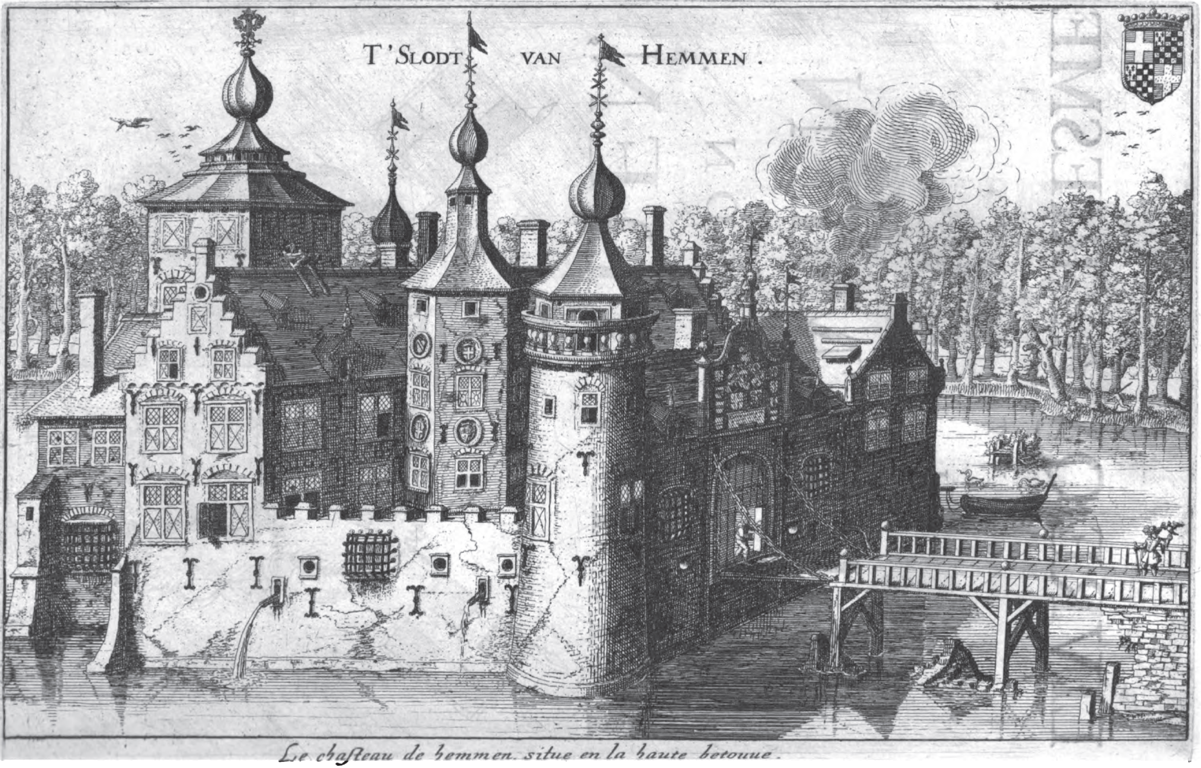 Chateau de Hemmen. Annales généalogiques de la Maison de Lynden. Christophe Butkens. Anvers, 1626.